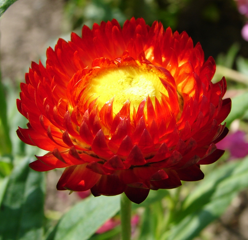 Xerochrysum bracteatum (kocanki ogrodowe)